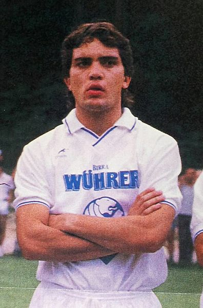 allenatore di calcio e giocatore brasiliano